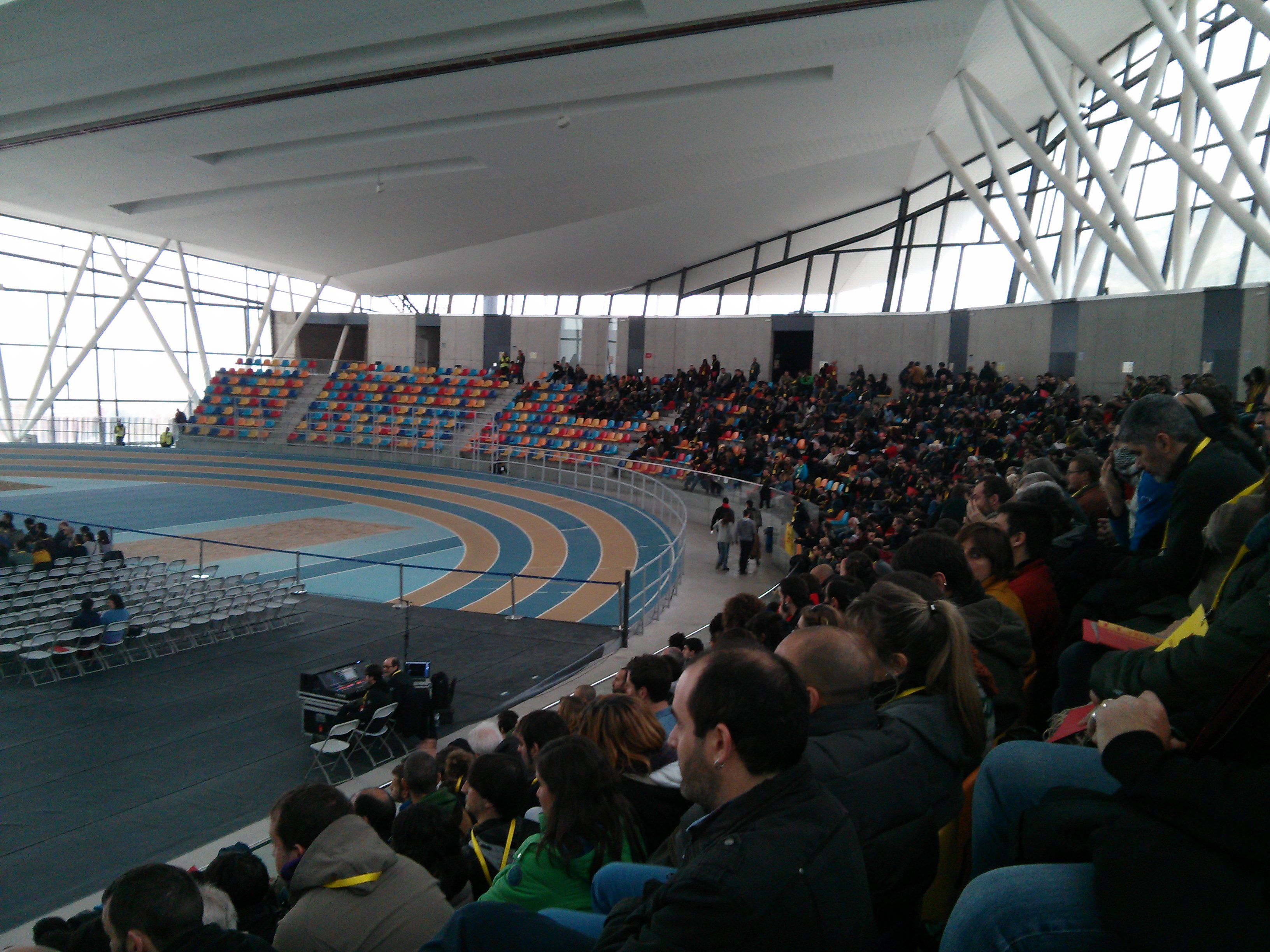 Assemblea Nacional extraordinària 27D 2015. 10 del matí.